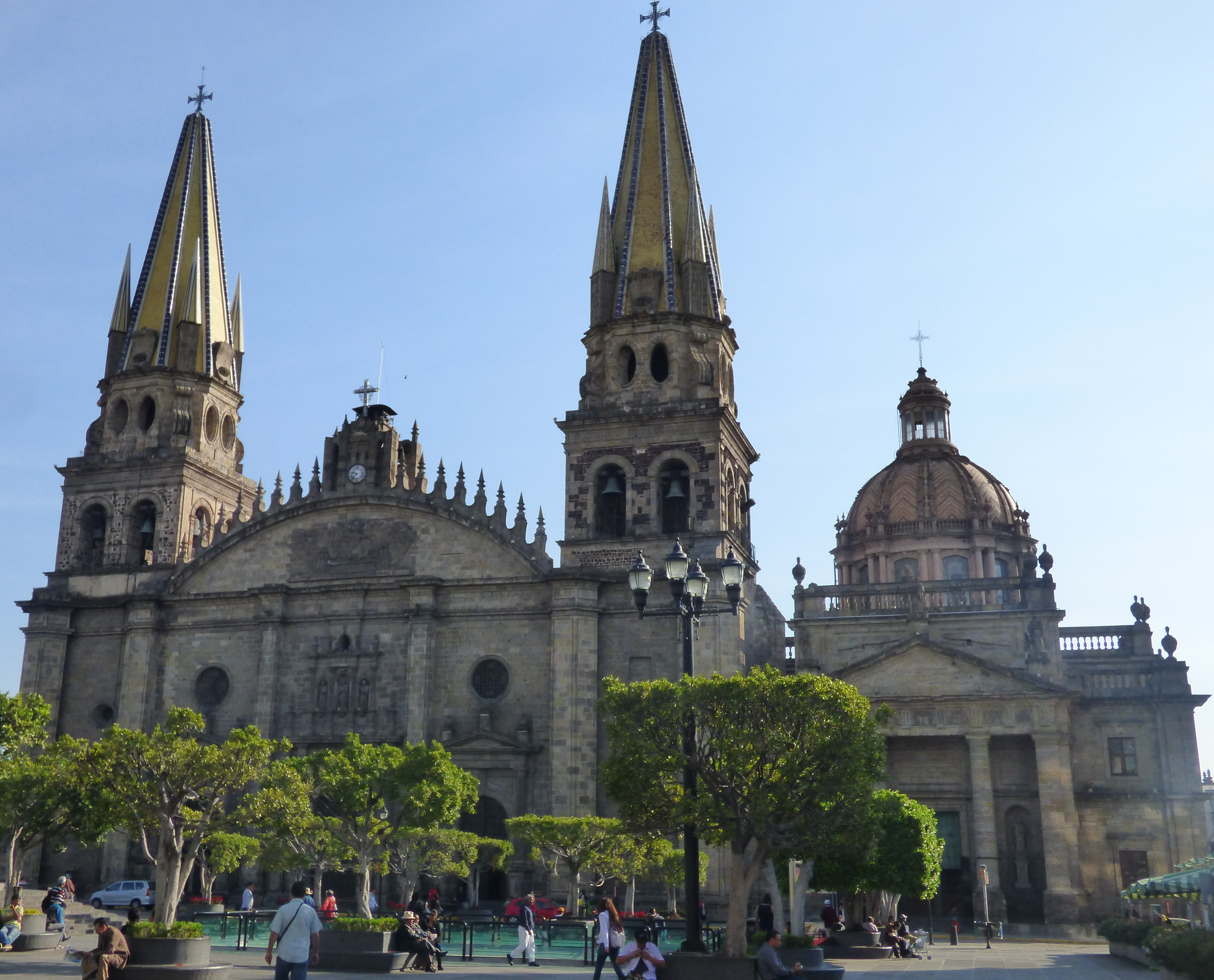 Vista de la Catedral de la Asunción de Nuestra Señora, Guadalajara, Jal.